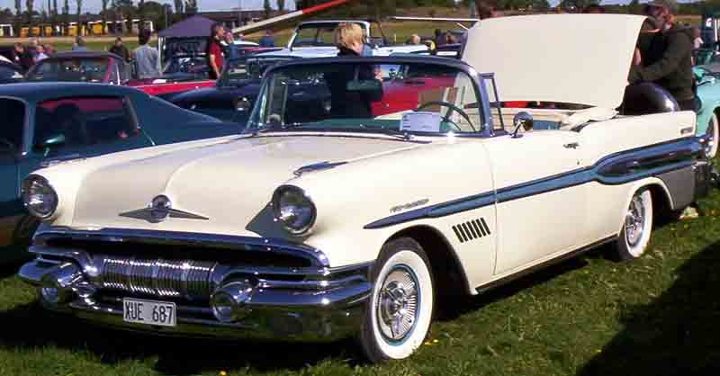 Pontiac Bonneville Convertible 1957